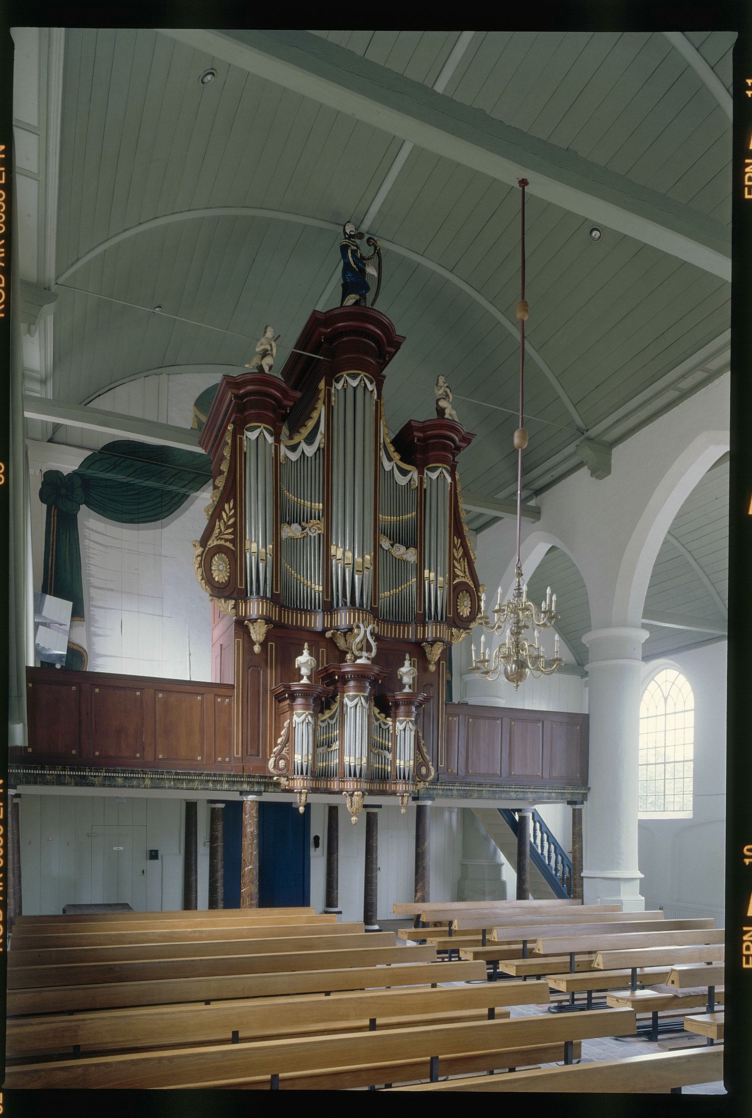 Nederlands Hervormde Kerk: Interieur, aanzicht orgel, orgelnummer 541 (opmerking: Gefotografeerd voor Het Historische Orgel in Nederland 1819-1840, bladzijde 83)